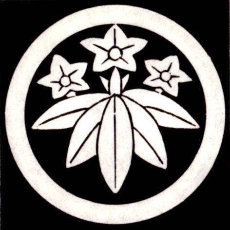 丸に笹龍胆